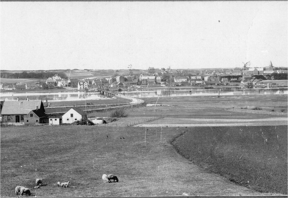 Hadsund set fra Hadsund Syd i 1910.